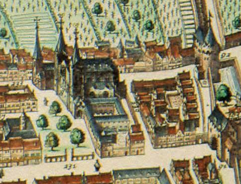 Collégiale Saint-Barthélemy et Eglise Saint Thomas (Liège) gravée au XVIe siècle par Joan Blaeu